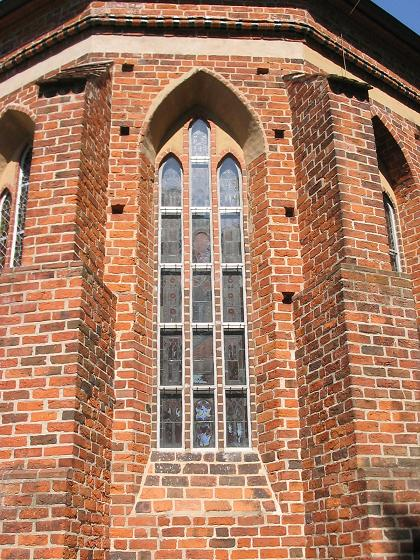 Kloster/Stift Marienfließ, Prignitz, Brandenburg. Klosterkirche.